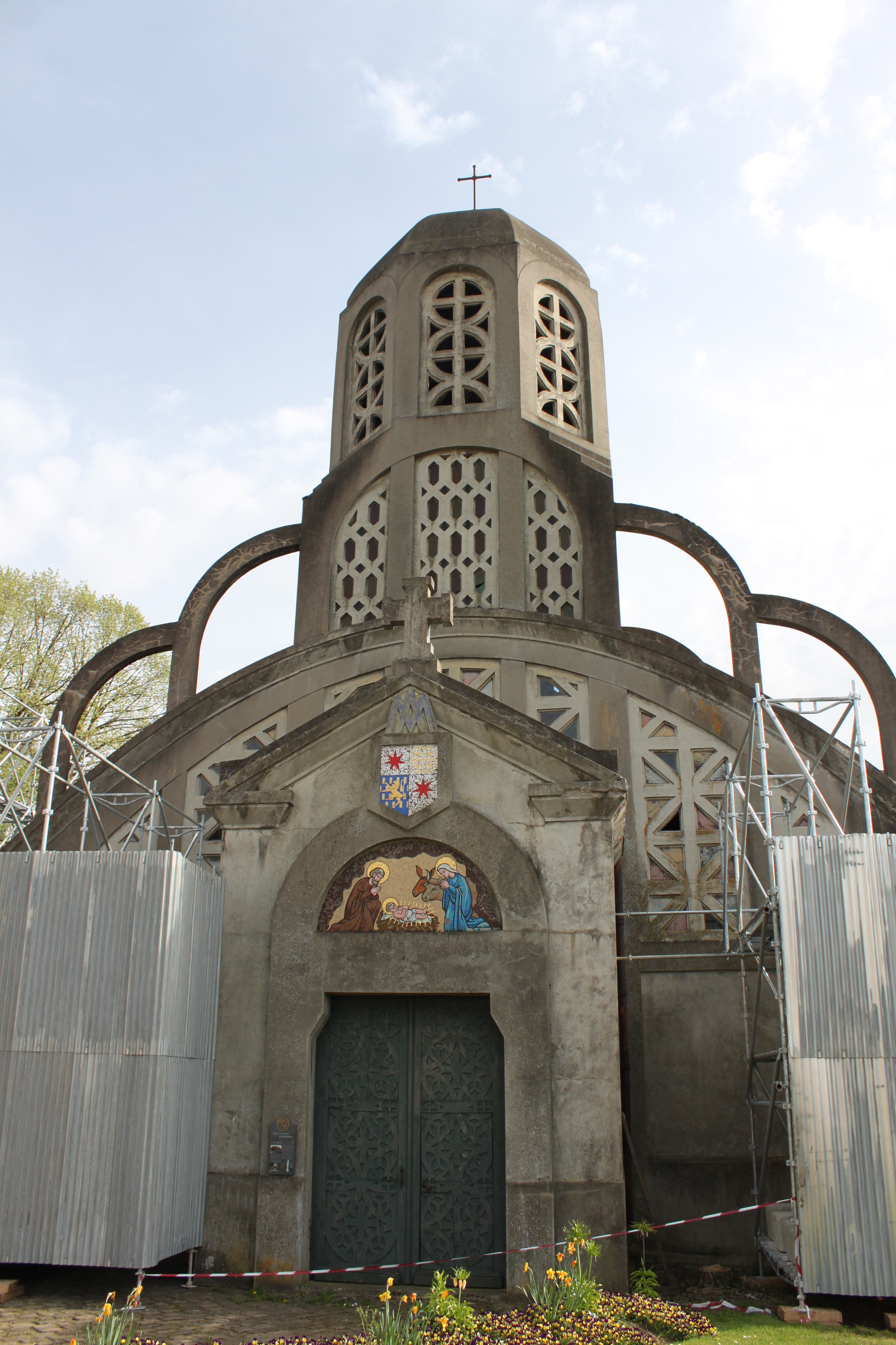 Clamecy, Nièvre, Bourgogne, France